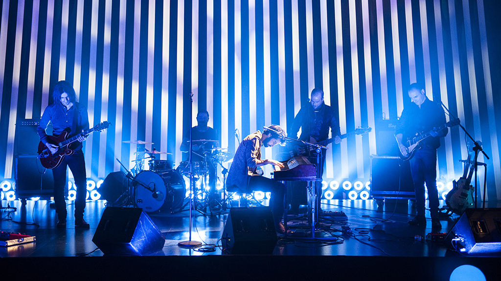 Cyan en una sesión de grabación para el programa Blue Zulu de TVE